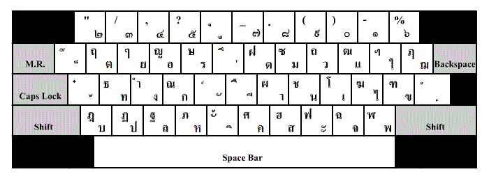 Thai keyboard Pattajoti layout